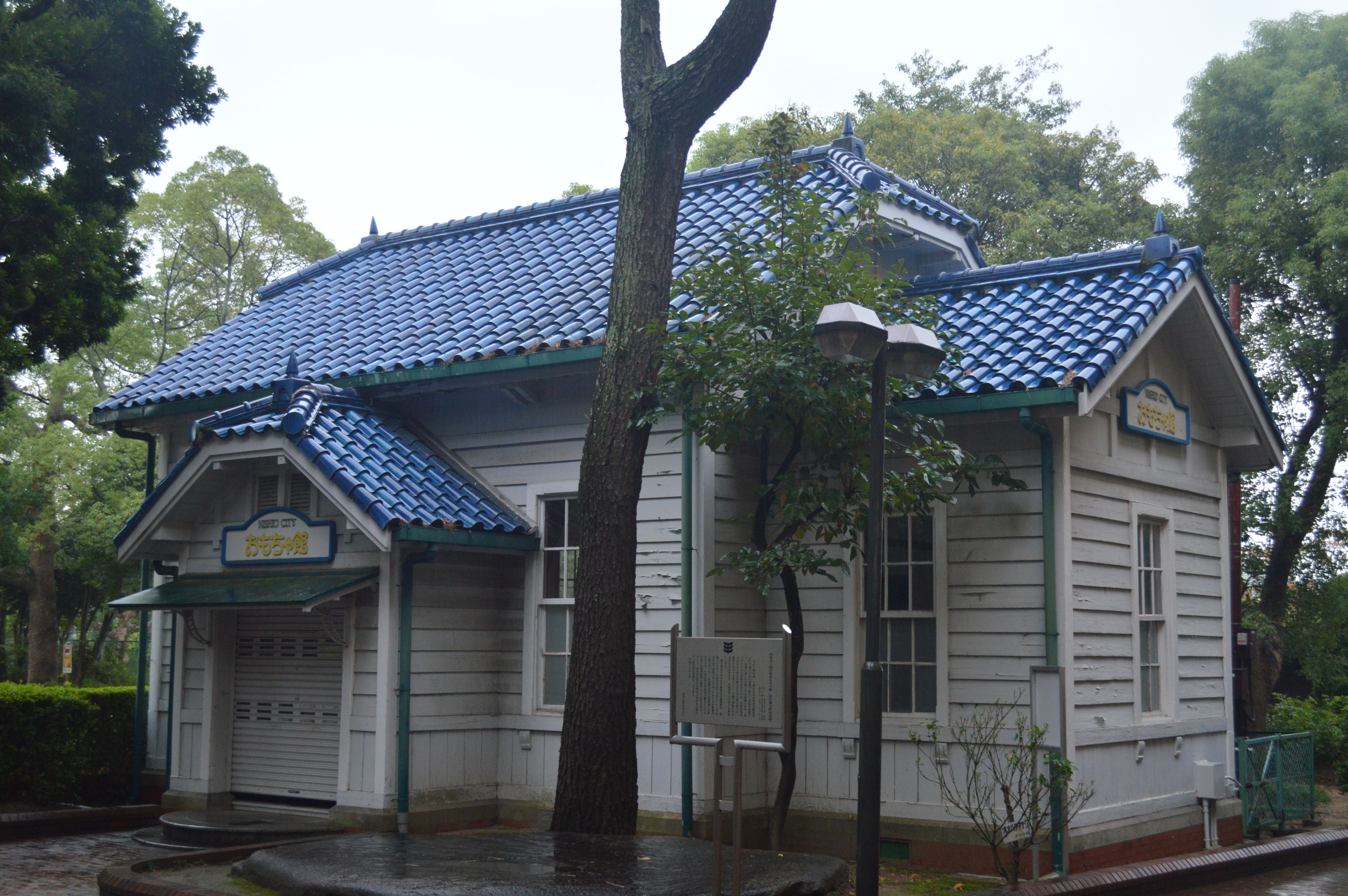 愛知県西尾市にある西尾市立図書館おもちゃ館（旧岩瀬文庫児童館）。国の登録有形文化財。